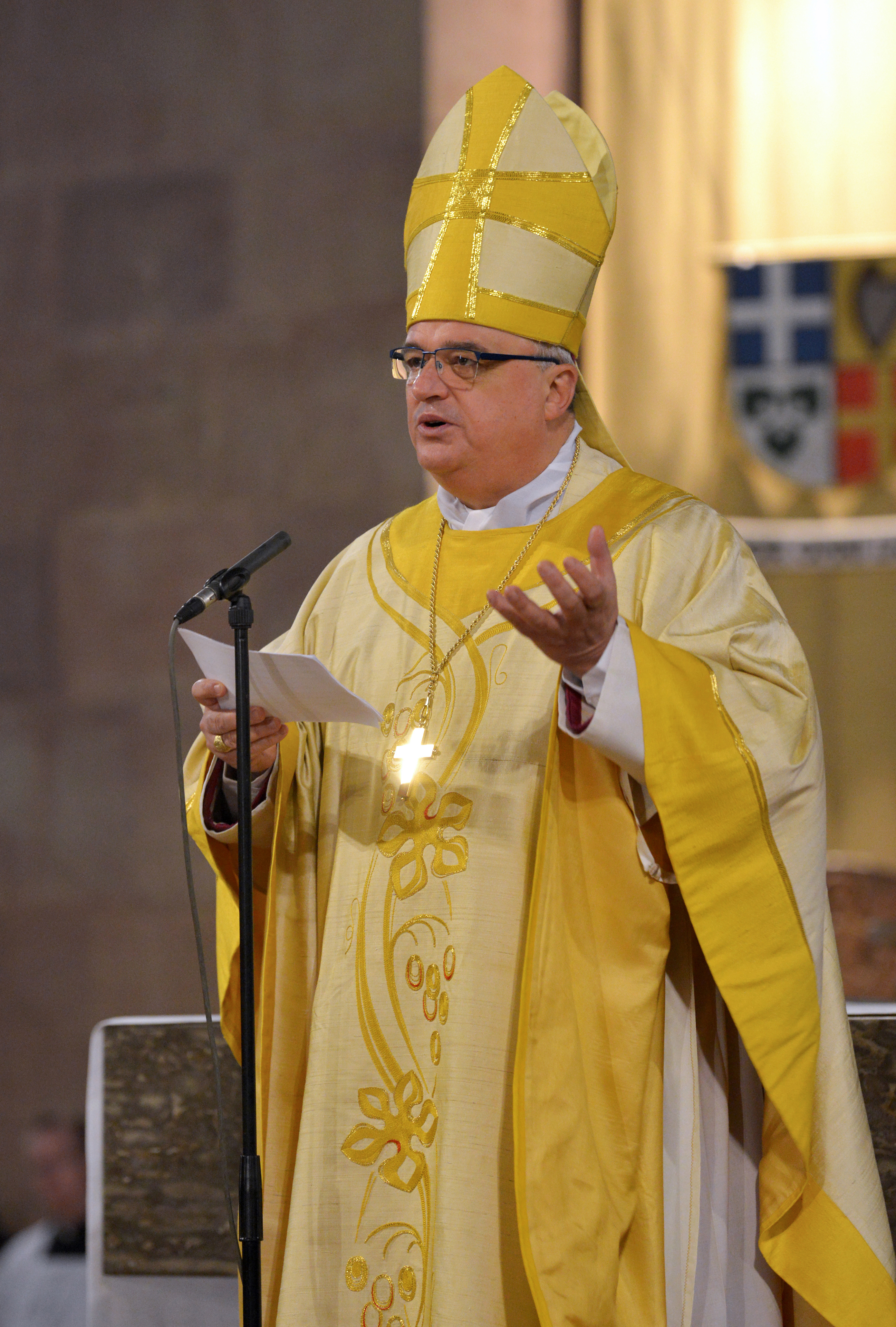 Speyer, Dom, Gottesdienst am 1. Weihnachtsfeiertag - Predigt Bischof Karl-Heinz Wiesemann